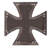 Kruis van Kulm 1813